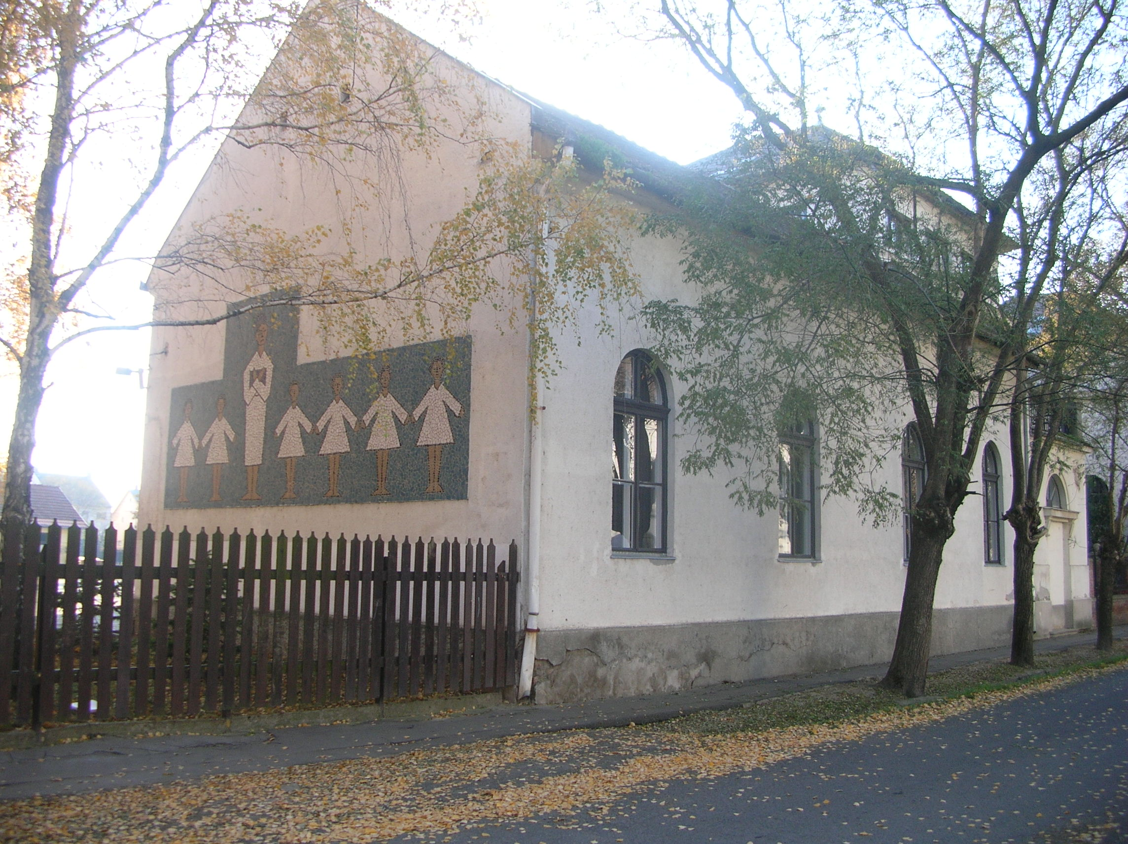 Makói Belvárosi Általános Iskola, kis tornaterem